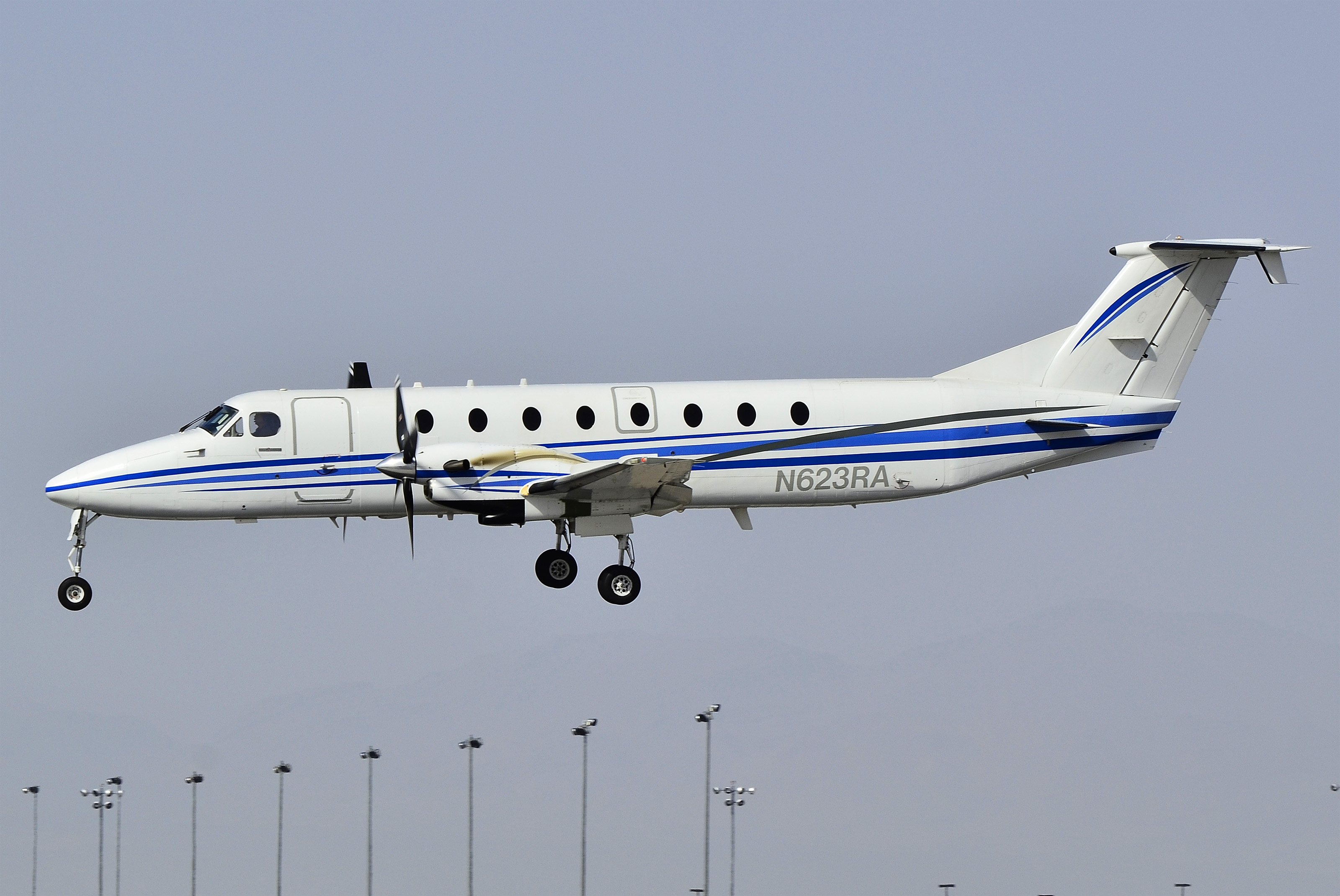 Las Vegas - McCarran International (LAS / KLAS) USA - Nevada, March 18, 2011 Photo: Tomás Del Coro